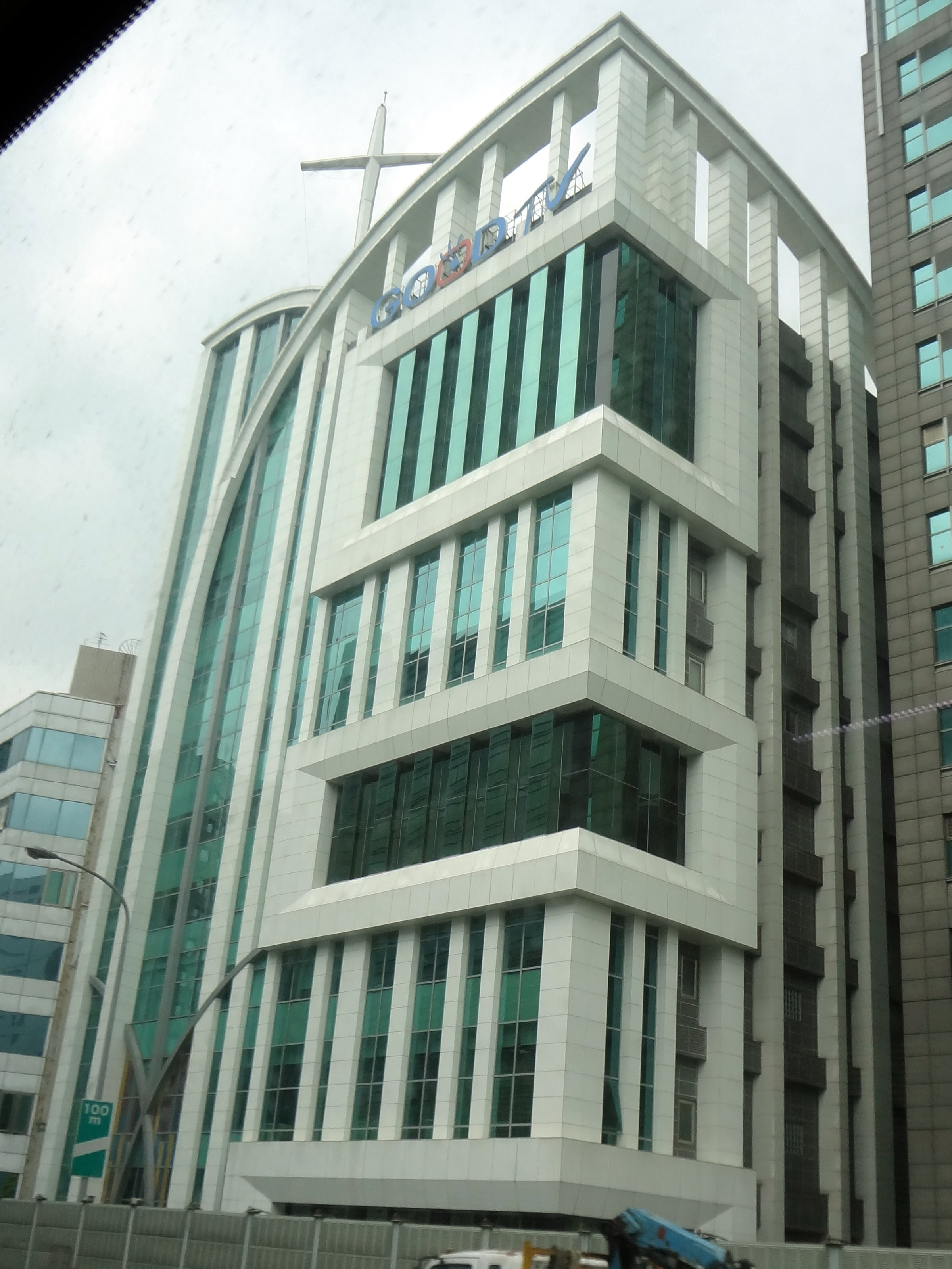 好消息衛星電視台媒體宣教大樓，拍攝於台64線大客車上。